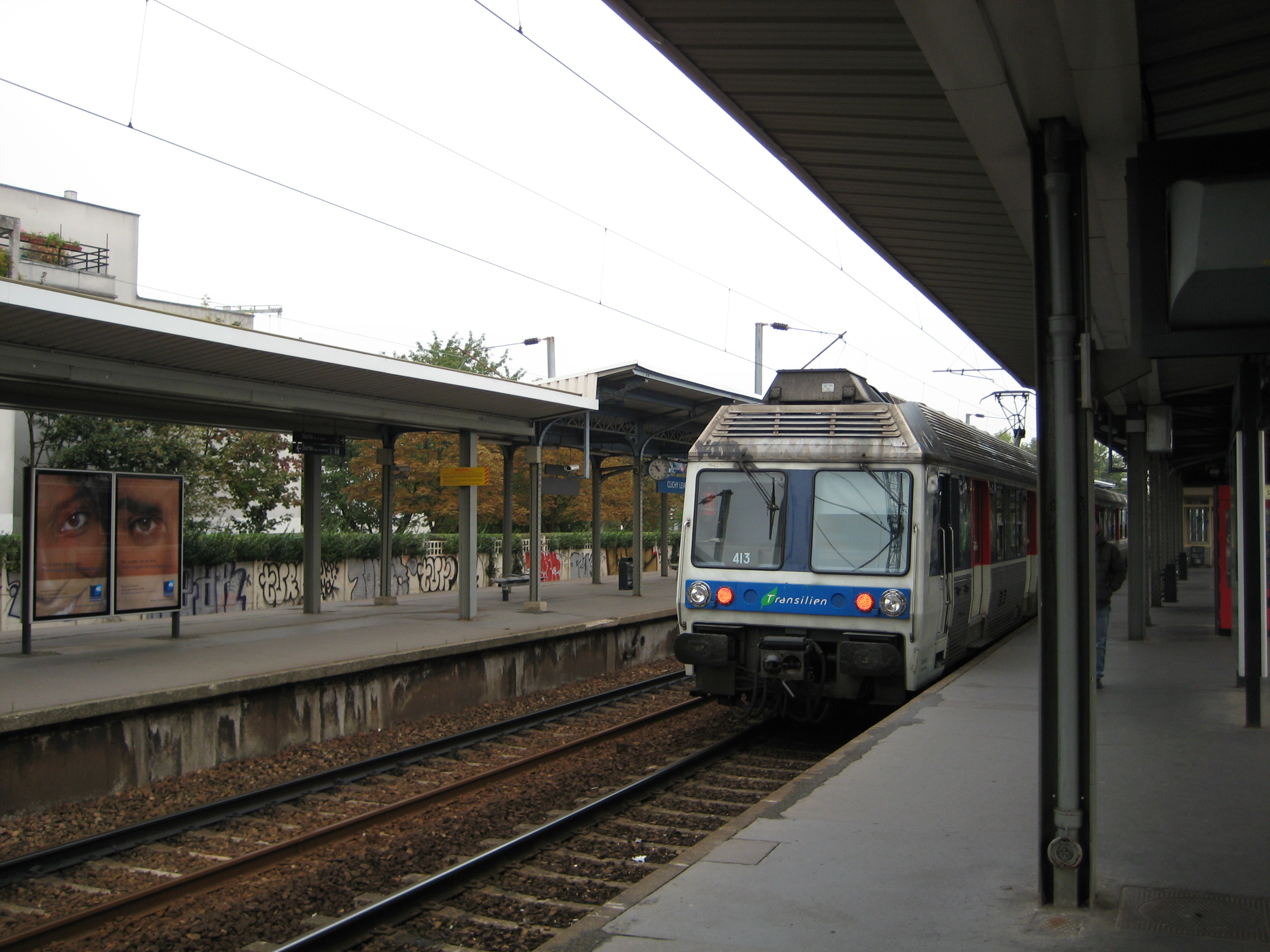 Photo de la gare de Clichy-Levallois